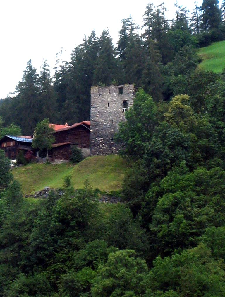 Ruine Bernegg